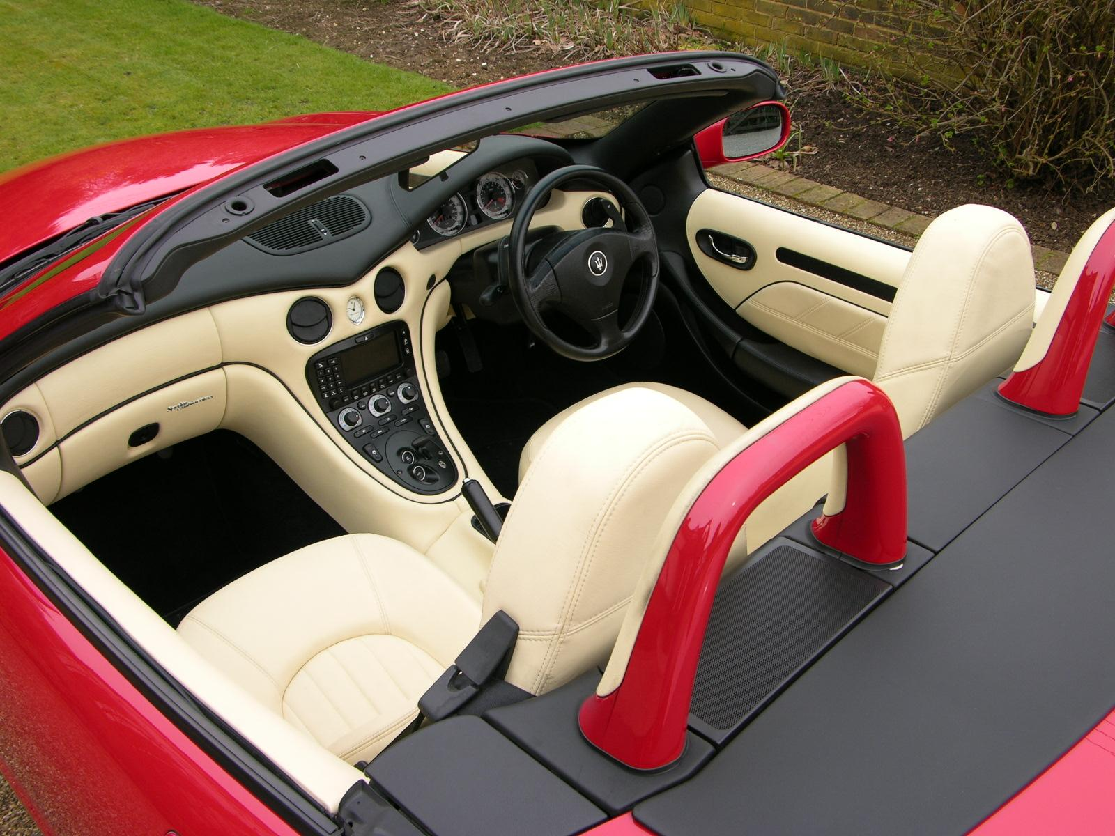 Maserati 4200 Spyder